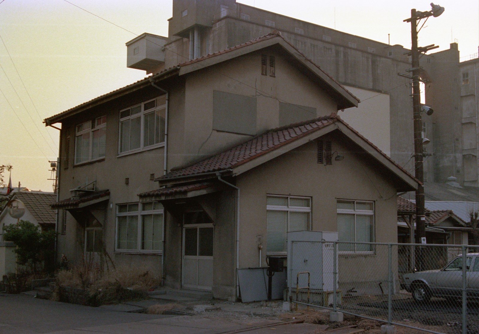 廃止一年後の日本国有鉄道山陽本線貨物支線・新川駅駅舎